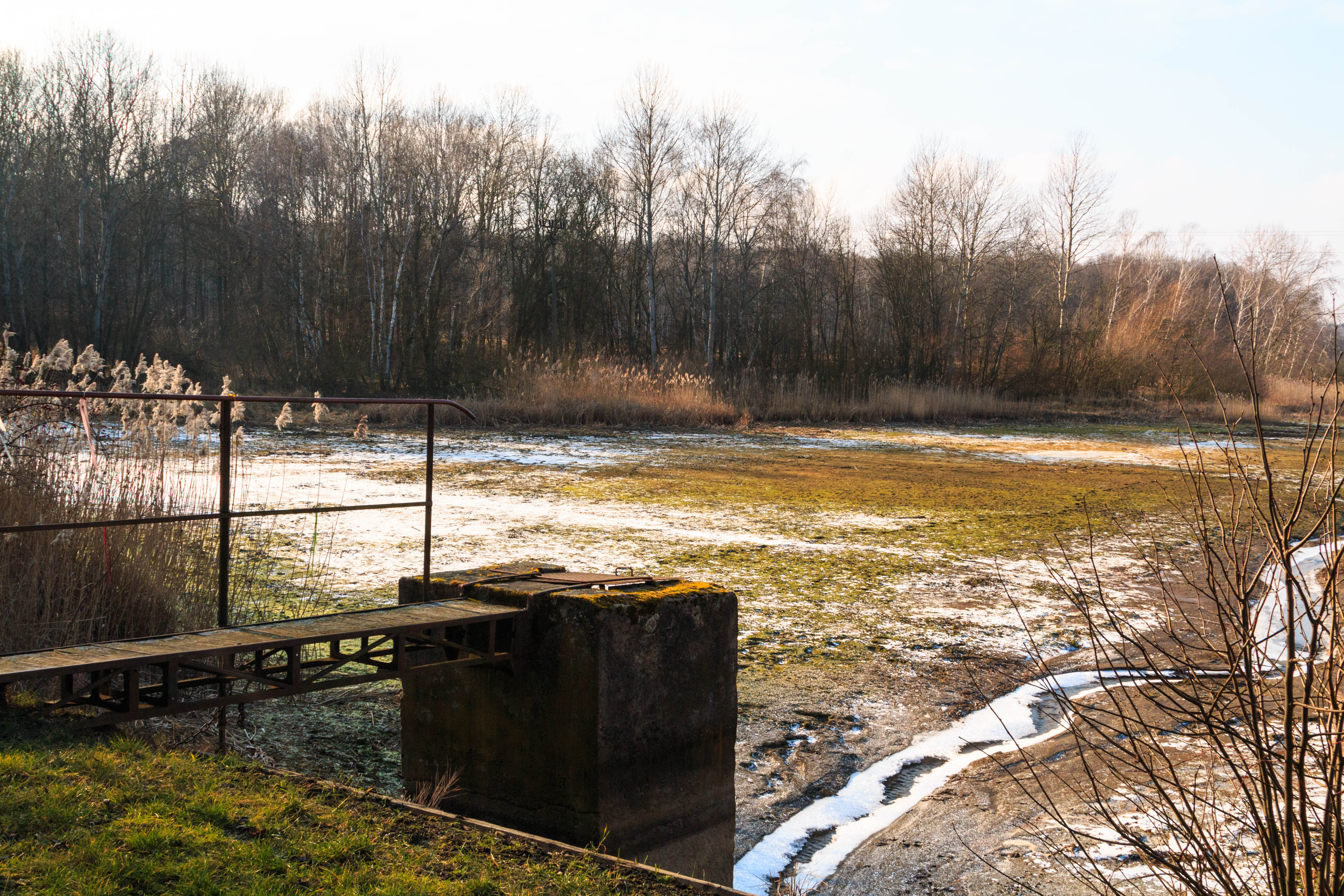 rybník Kamenec u obce Pravy Project: Vodstvo.